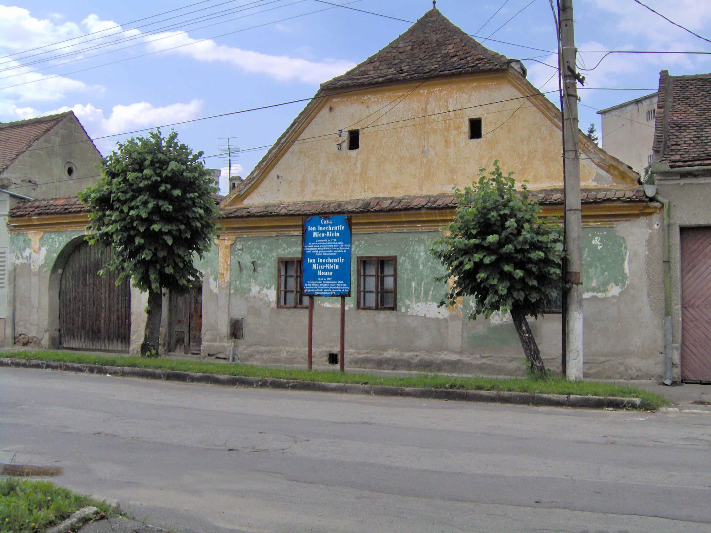 Casa Ioan Inochentie Micu-Klein din Făgăraş (1727)